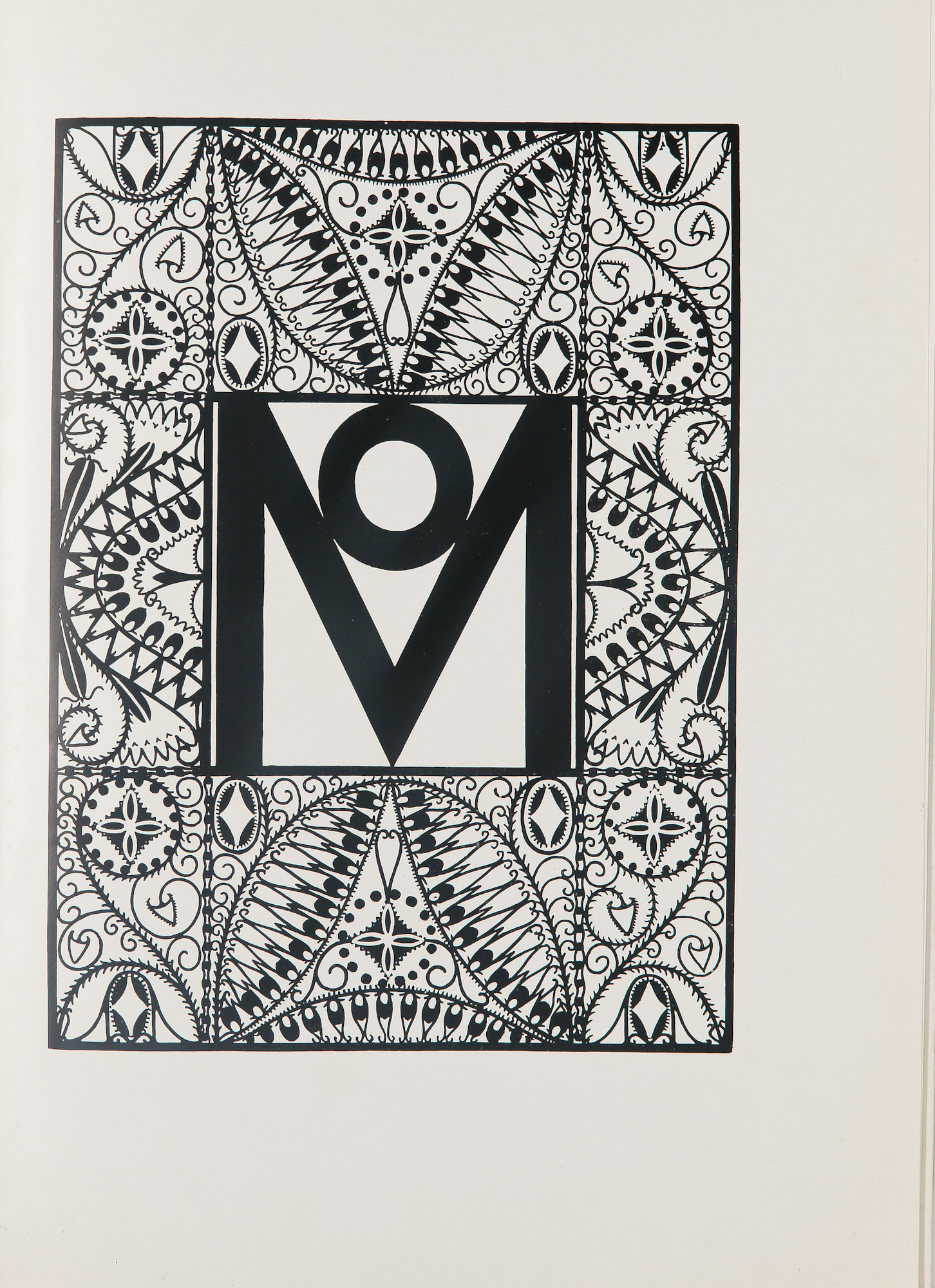 BmN : cote 655 153